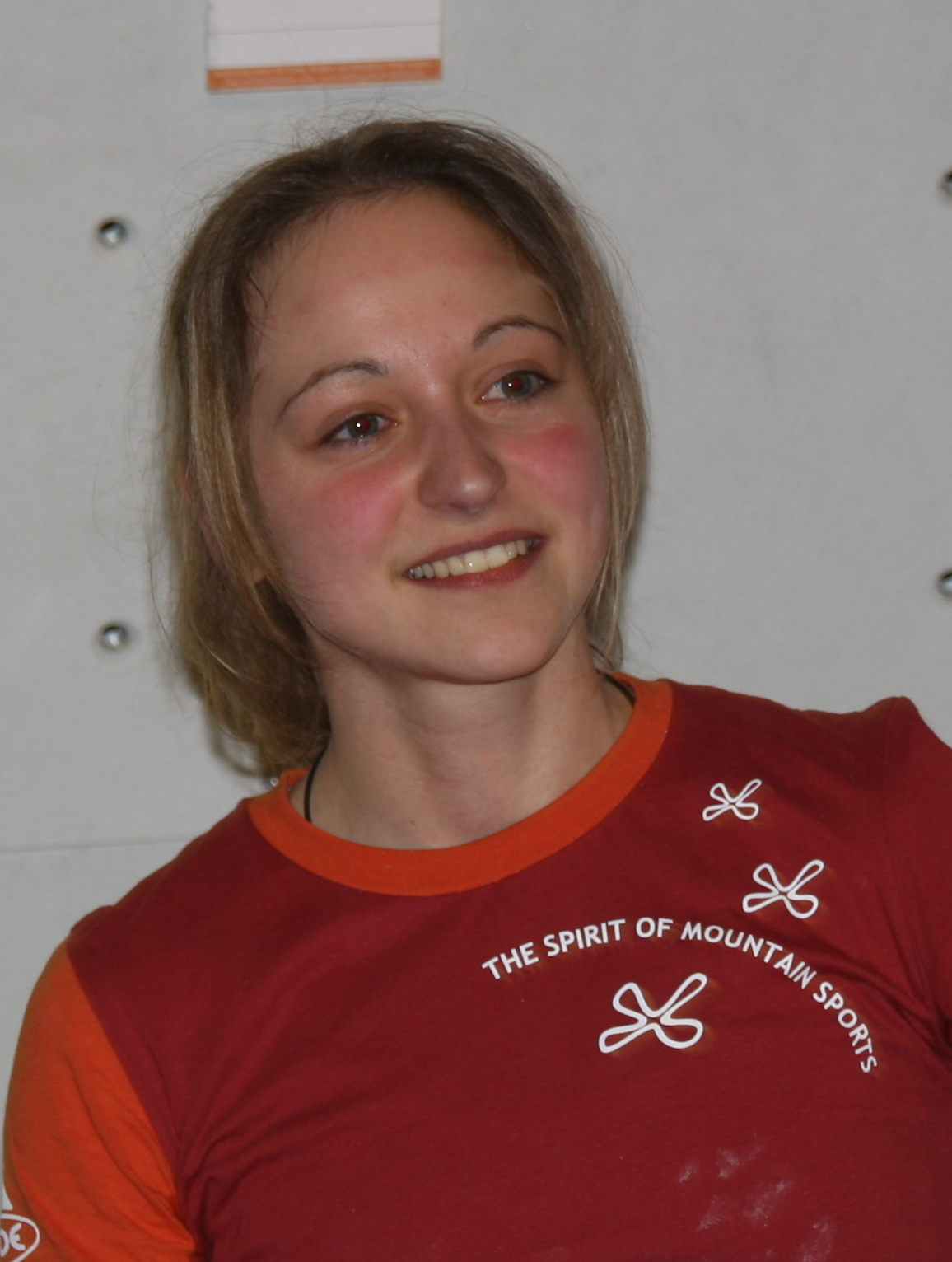 Angela Eiter bei der Veranstaltung Challenge The Wall im Kletterzentrum Gilching